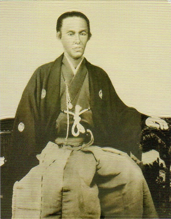 有馬頼咸の肖像写真。